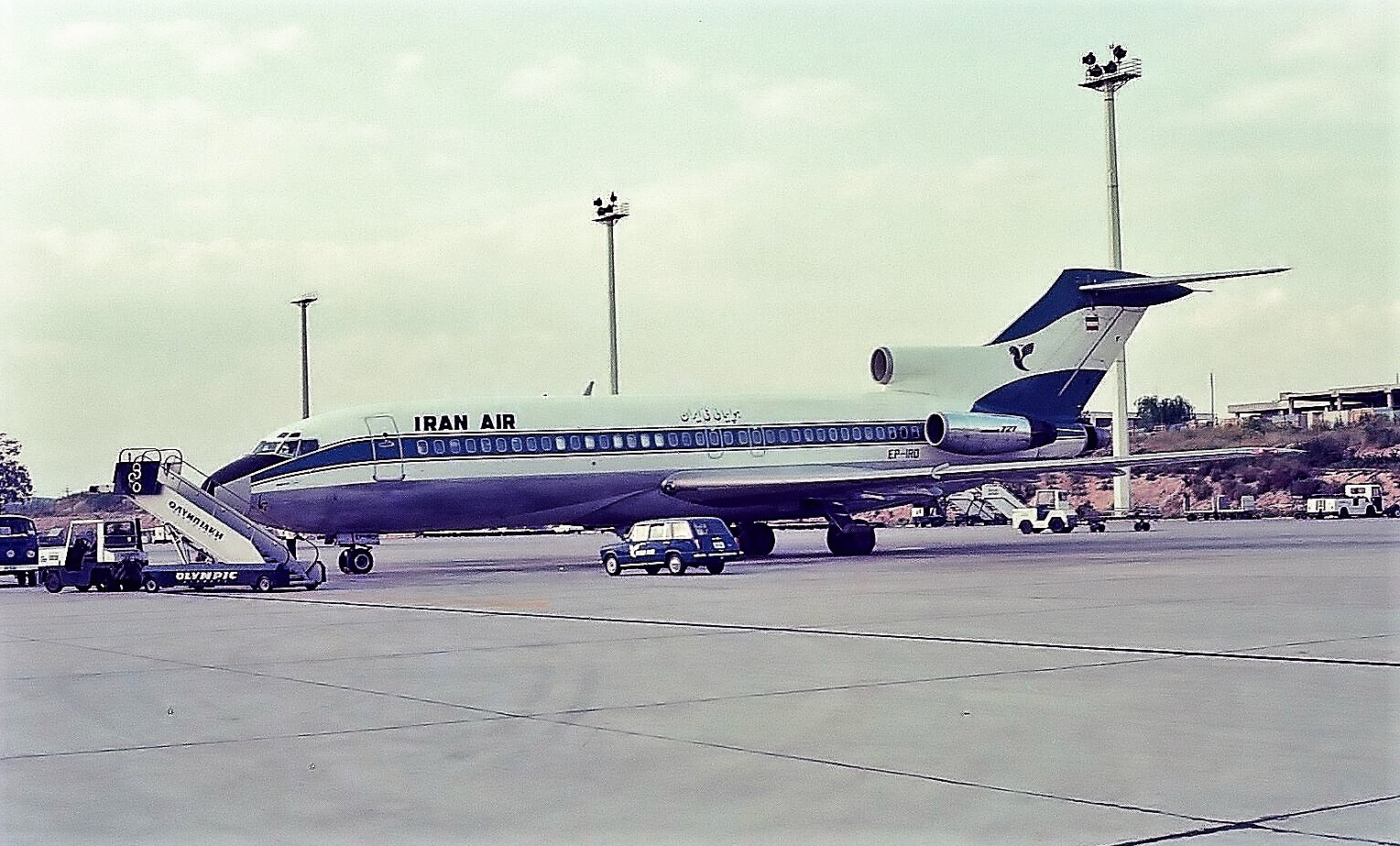 EP-IRD Boeing 727-86 (Iran Air) at ATH 14.4.1977; crashed 30 km N of Tehran-Mehrabad Airport 21.1.1980, all 128 on board killed